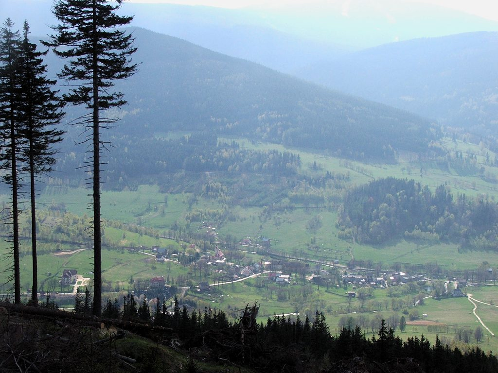 Wieś Bolesławów widziana z Suszycy (woj. dolnośląskie)